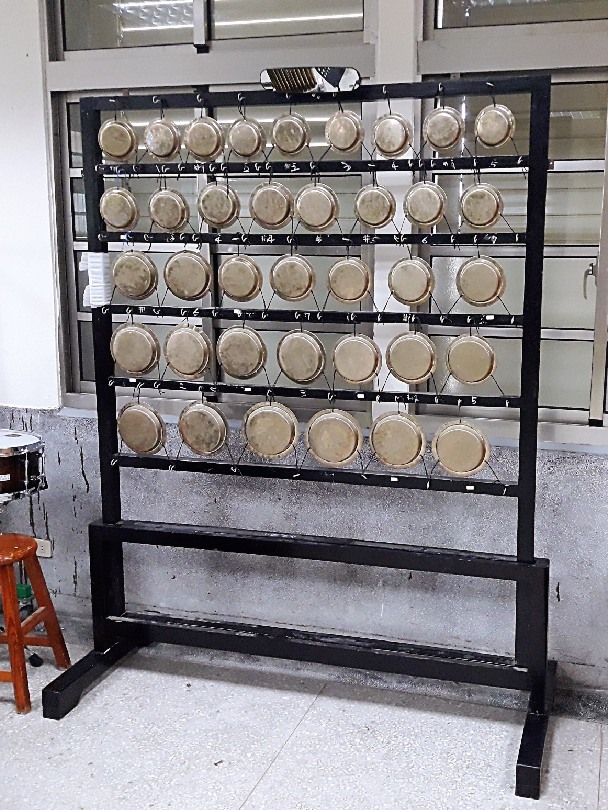 中國傳統打擊樂器雲鑼。